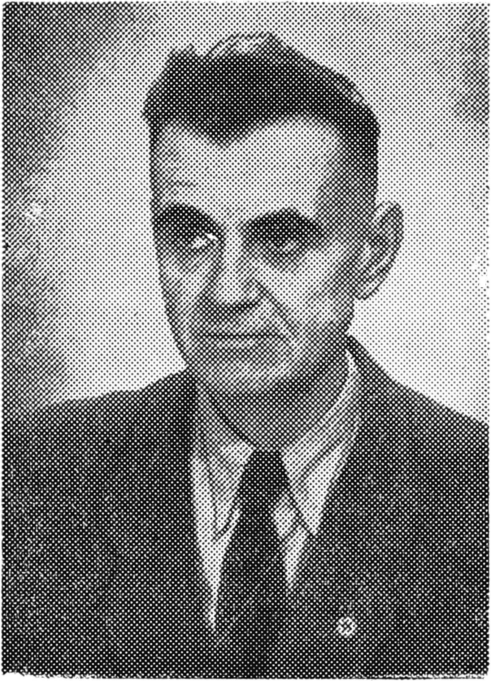 Kazimierz Domosławski, polski esperantysta (1893–1960)